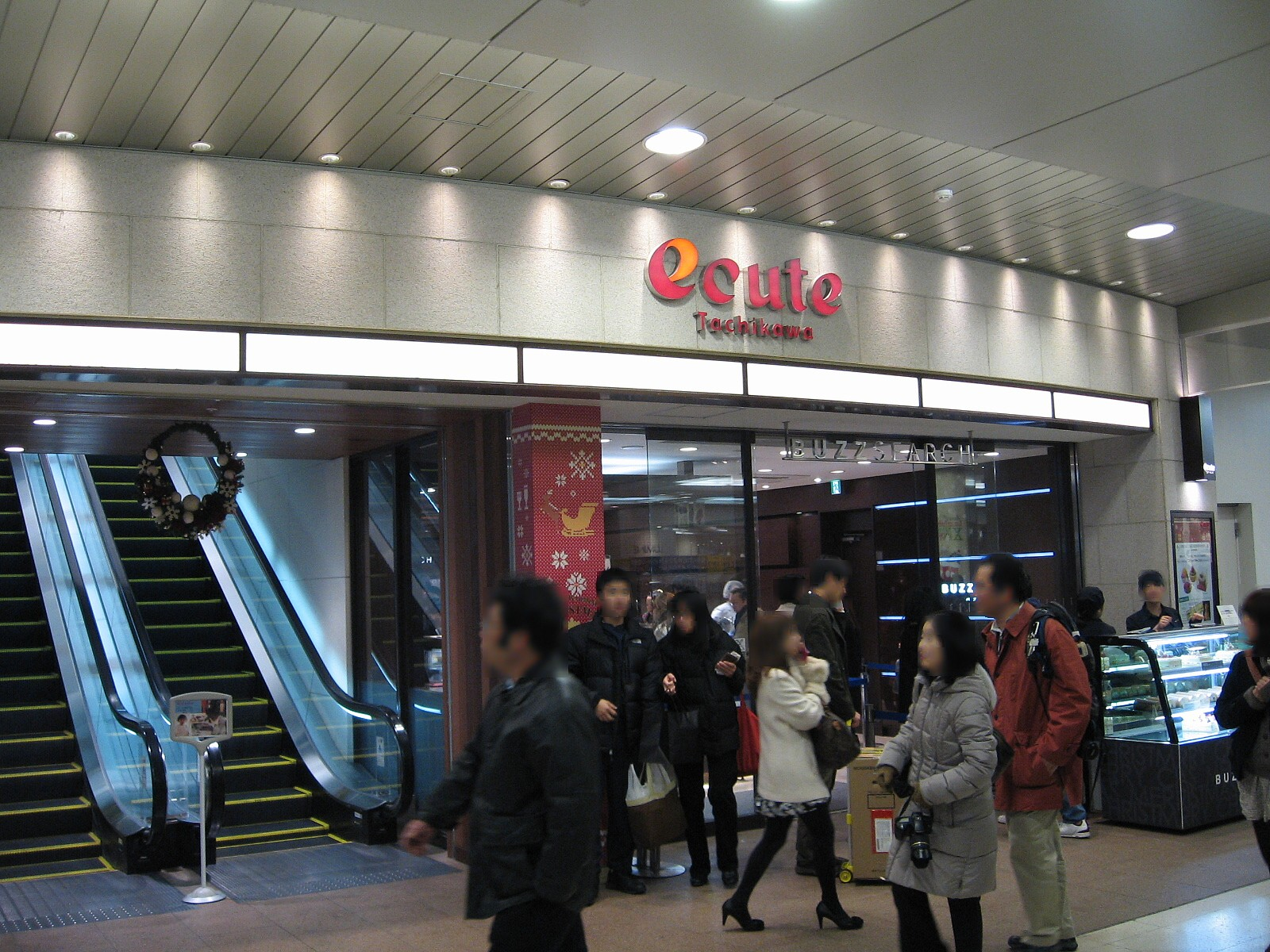 JR立川駅エキナカ「ecute（エキュート）立川」